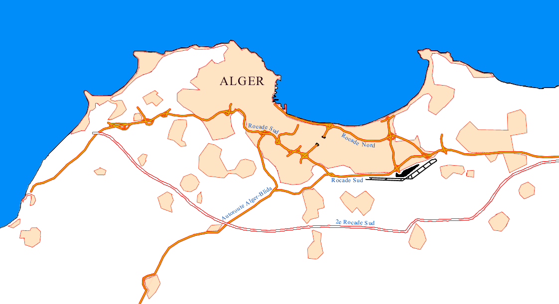 Reseau autoroutier d'Alger. Création personelle Utilisateur:Medifel Licence Art Libre